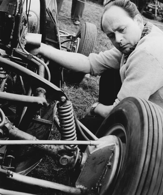 Zentralbild Kohls 23.4.1961 Auf der Halle-Saale-Schleife dröhnen die Motoren Am 23.4.1961 erfolgt um 10.00 Uhr der Start zum Internationalen Rennen auf der Halle-Saale-Schleife. Bereits in den frühen Morgenstunden des 22.4.61 trainierten die Fahrer und machten sich so mit dem Kurs vertraut. UBz. Heinz Melkus (MC Post Dresden) baut im Fahrerlager an seinem Melkus-Wartburg.